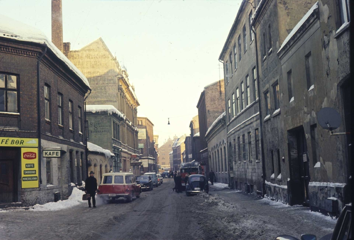 Tomtegata sett fra hjørnet av Persgangen mot Akerselva. Gateløp, bygårder, kafé Bør, mennesker, biler, sykebil, Vaterlands asyl.